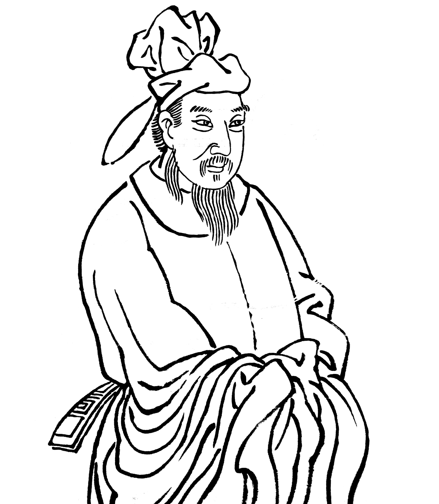 中文（中国大陆）: 大理州博物馆-人像-郑回